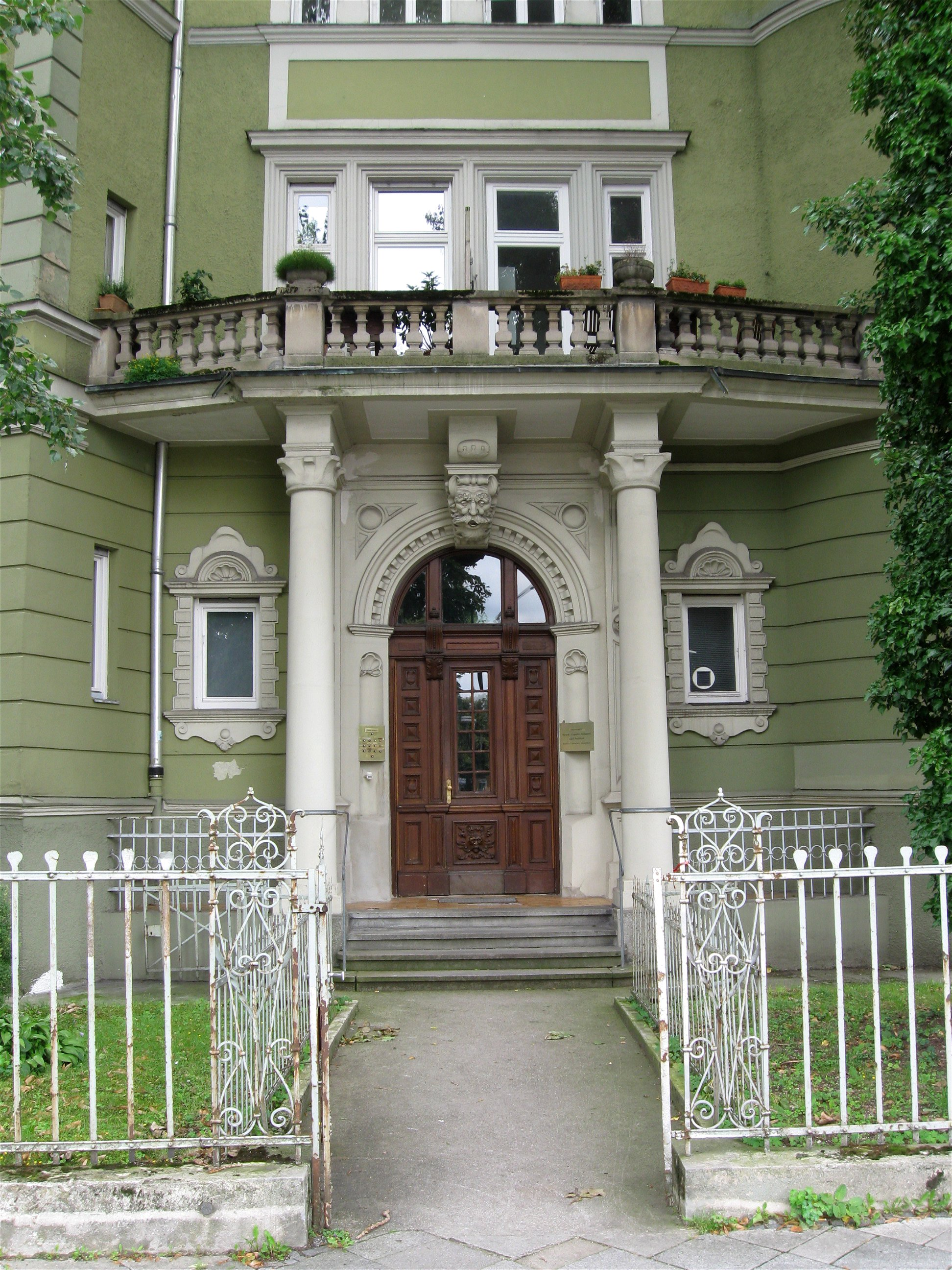 Mozartstraße 23; Mietshaus, Neurenaissance, 1896 von Hans Weber, mit Nr. 18 die Einmündung in den halbrunden Esperanto-Platz flankierend.